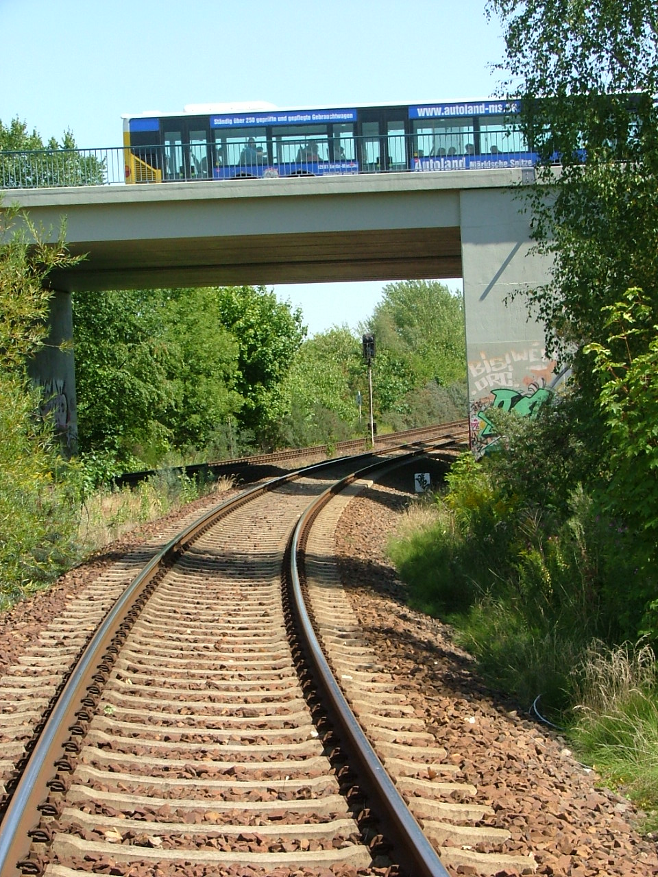 Biesdorfer Kreuz: Blick von der Verbindungskurve 6075 Richtung BBIKL, links die Strecke von BBIKL nach BBKN